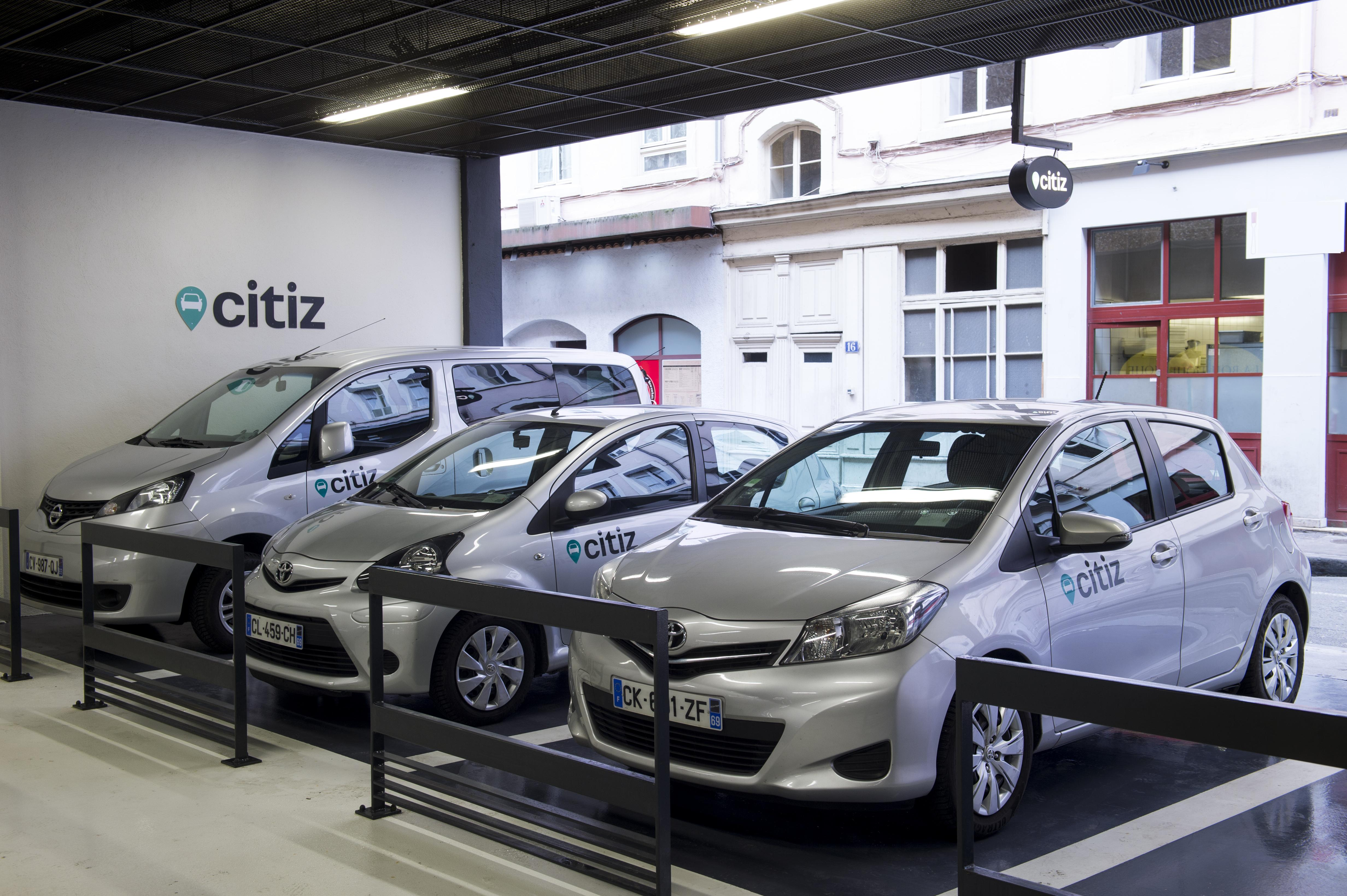 Station Citiz LPA Cordeliers - Autopartage lyonnais